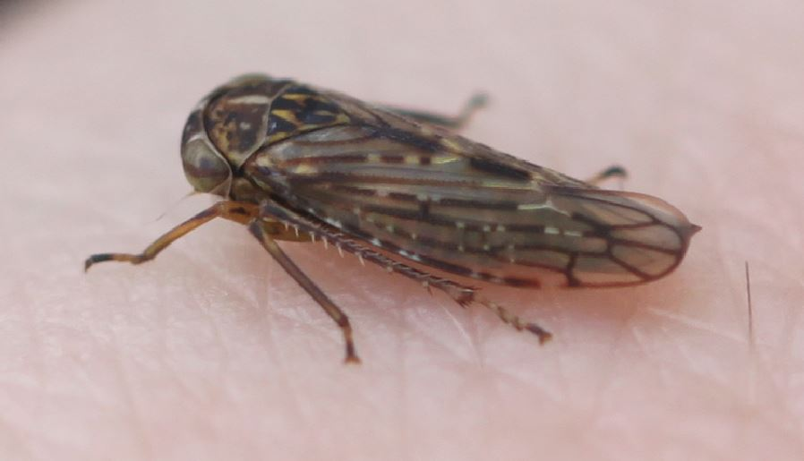 Bärtige Winkerzikade (Idiocerus herrichii) am 1. Februar 2020 an einer Weide in Walldorf/Baden